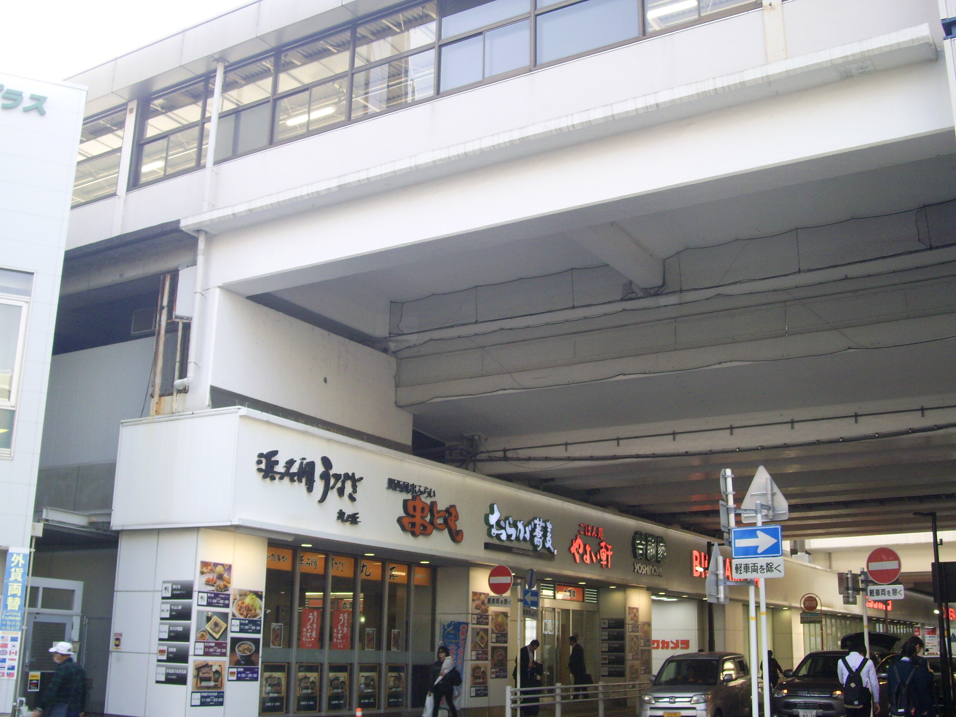 JR浜松駅の駅ビル「メイワン」のビックカメラ館、東海道新幹線の高架下に立地する ㊟カメラを起動すると日付機能が出荷時のものに初期化されるため、ファイル履歴の投稿日時とメタデータの原画像データの生成日時が異なります（本概要欄の下記日付が撮影日）